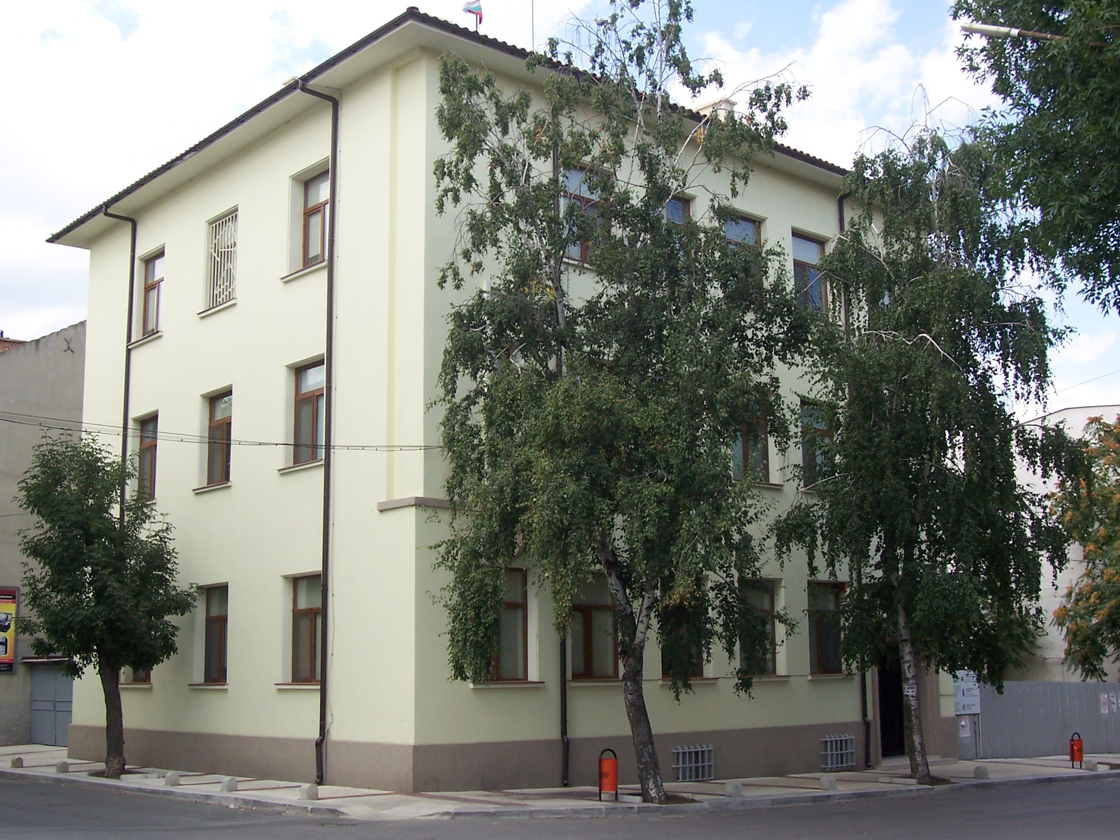 Сградата на Община Карнобат, автор © 2006 Димитър Колев